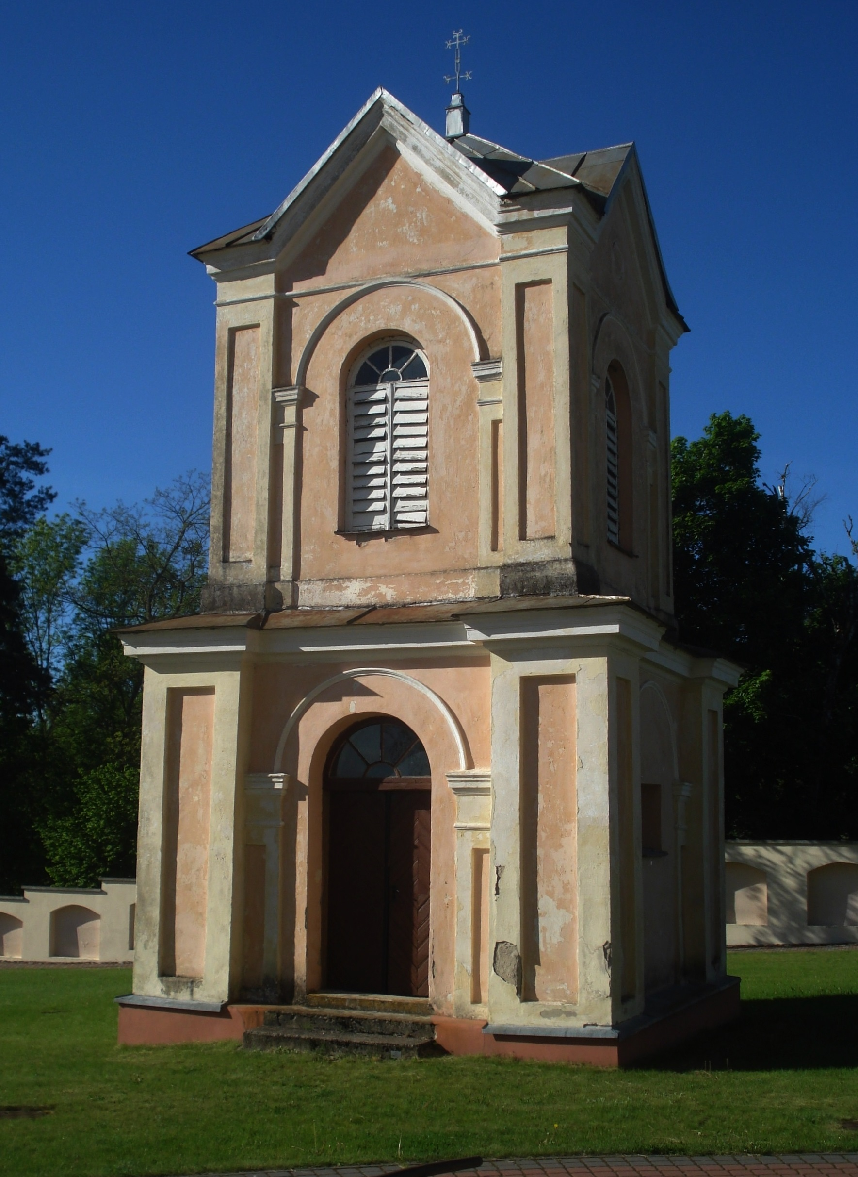 Колокольня ансамбля костёла Пресвятой Троицы и бывшего доминиканского монастыря в Лишкяве (1881-1884).